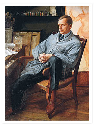 Александр Яковлев. Портрет Василия Шухаева в его студии 1928. Холст, масло. 131 x 97. Цена продажи: 2,5 млн. фунтов. Christie’s. 13.06.07. Лот № 79